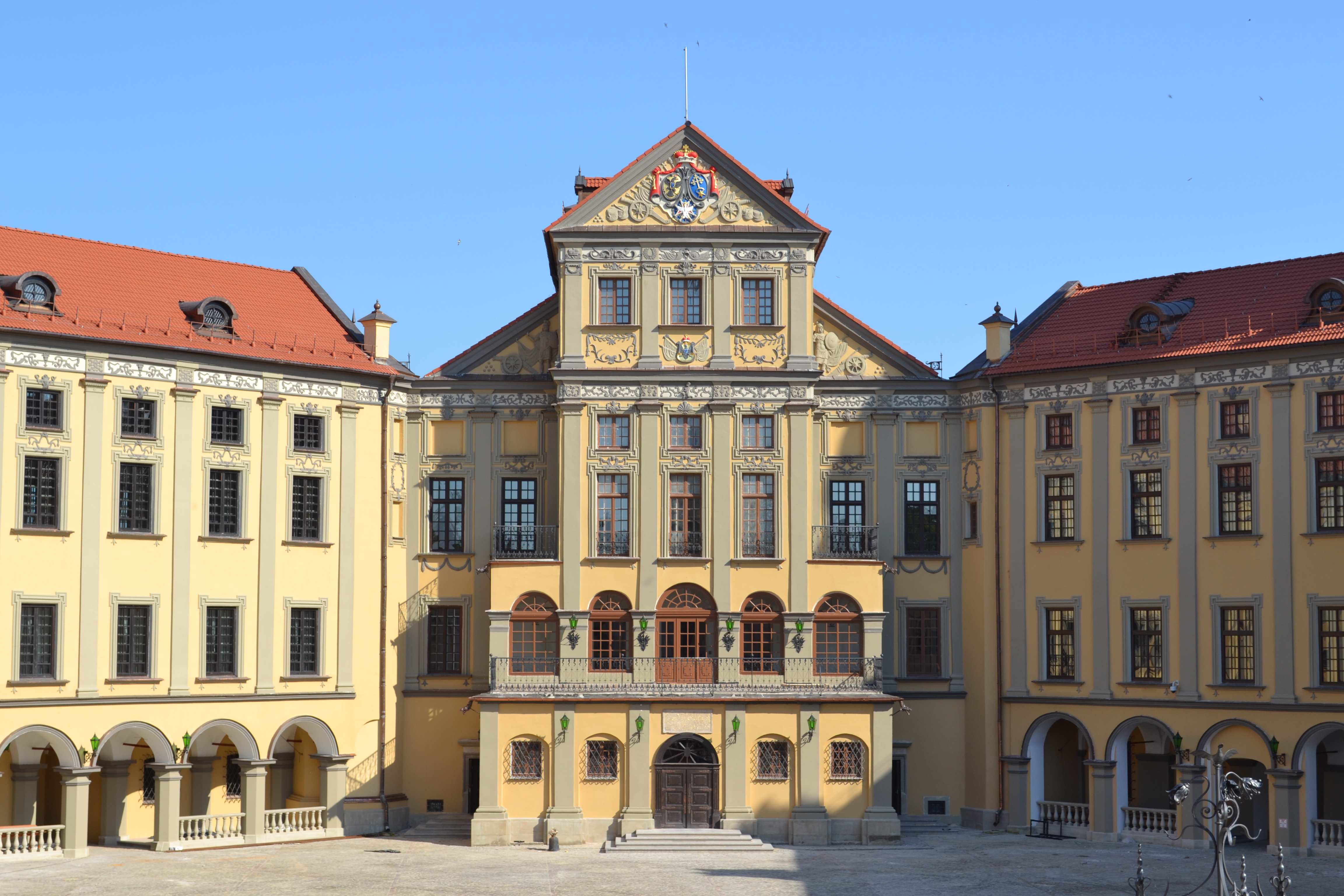 Беларуская (тарашкевіца): Палацава-паркавы ансамбль:замак-палац, паўднёвая і ўсходняя галерэі, камяніца, арсэнал з капліцай, брама, два прыбрамныя корпусы, паўночна-ўсходняя і паўднёва-заходняя галерэі, лядоўня, стайня;абарончыя збудаваньні і мост;тэрыторыя паркаў:Замкавы, Стары, Японскі, Ангельскі, Новы;водная сыстэма:Дзікі, Замкавы, Бэрнардынскі ставы. г. Нясьвіж This is a photo of Belarusian heritage monument. Reference number: 610Г000466 ( WLM)